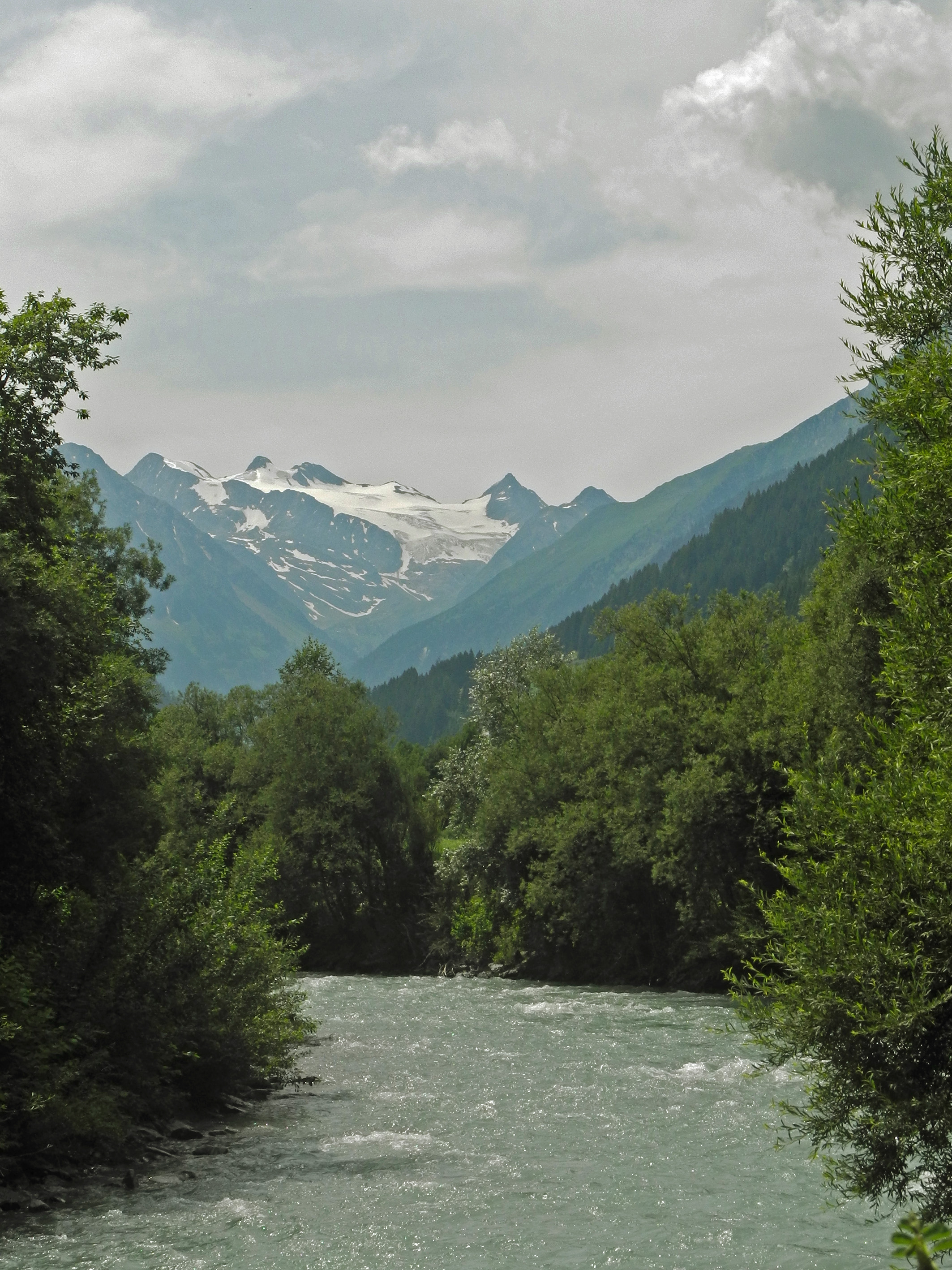 Blick über die Ruetz bei Neustift zum Sulzenauferner, mit Wilder Pfaff (3456 m), Zuckerhütl (3507 m), Pfaffenkogel (3366 m) und Aperer Pfaff (3353 m) (von links nach rechts)